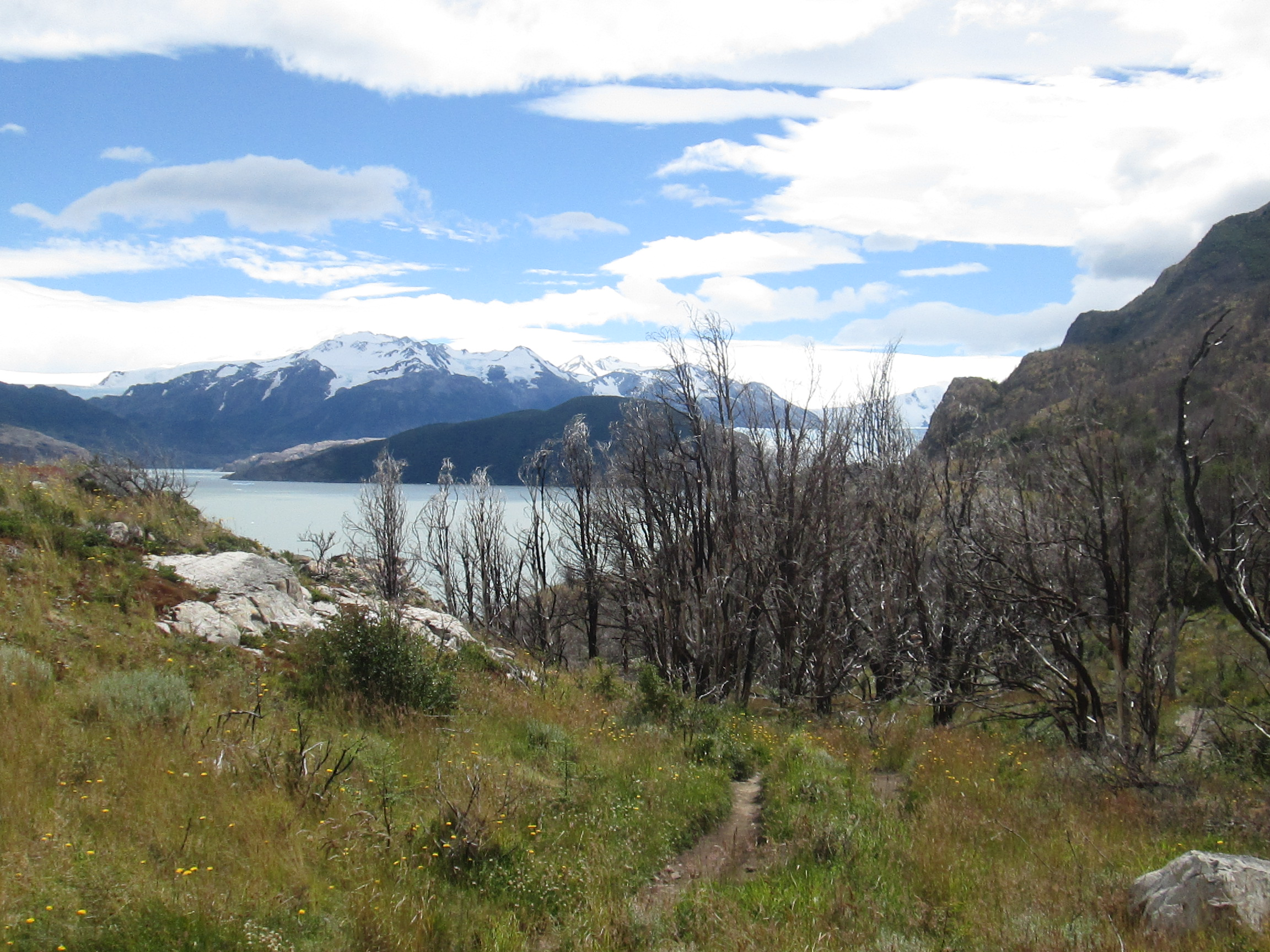 Ruta Grey - Paine Grande, con árboles quemados del incendio del 2011.